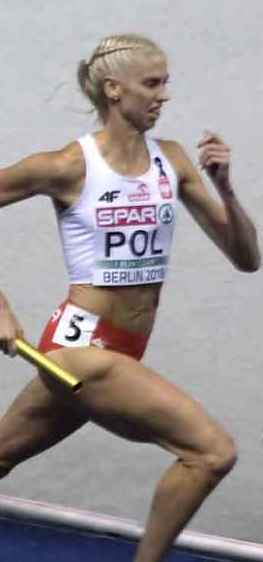 EKB42724 4x400m dames claes